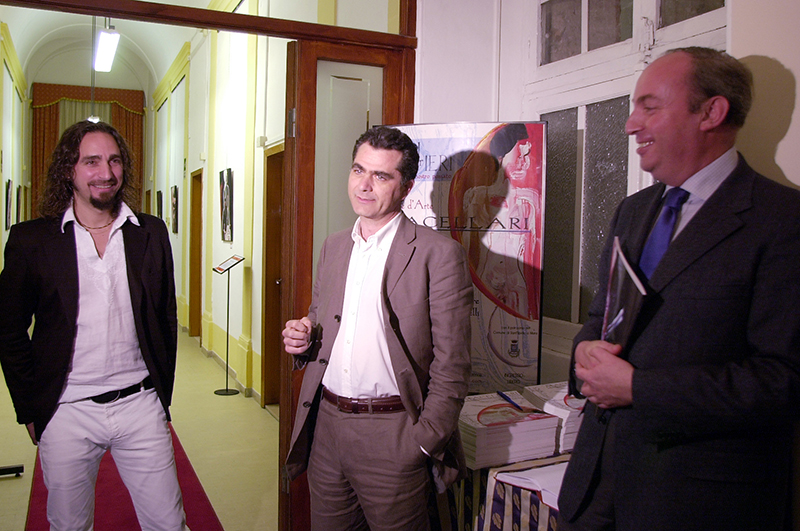 Giordano Macellari, Antonio Santori e Stefano Papetti nel 2005, in occasione dell'inaugurazione della mostra di Macellari dal titolo "Oggi per ieri. Un futuro per il nostro passato", presso la Pinacoteca civica "Vittore Crivelli" di Sant'Elpidio a Mare.